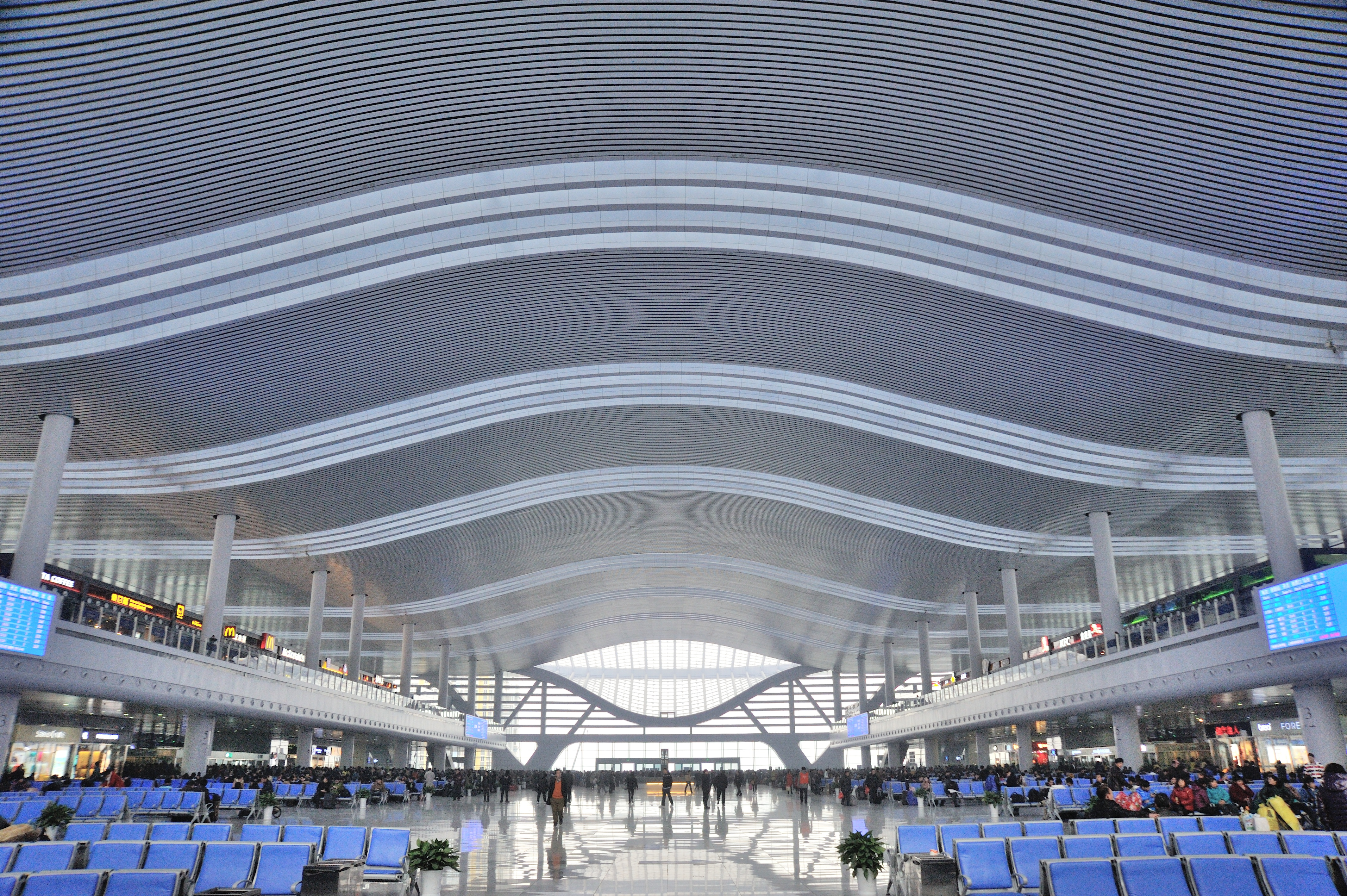 宁波站站房顶部